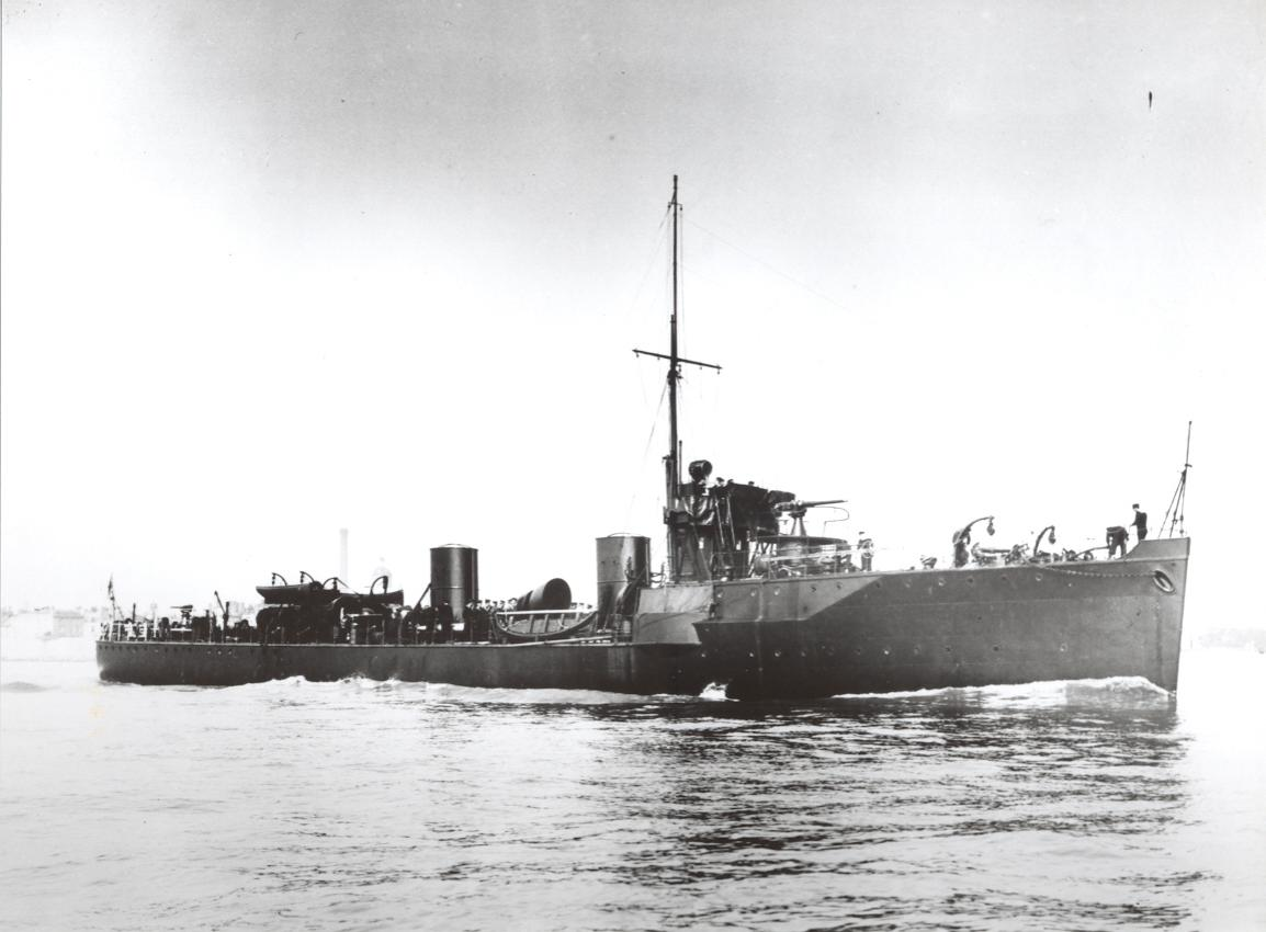 Der britische Turbinenzerstörer HMS Eden